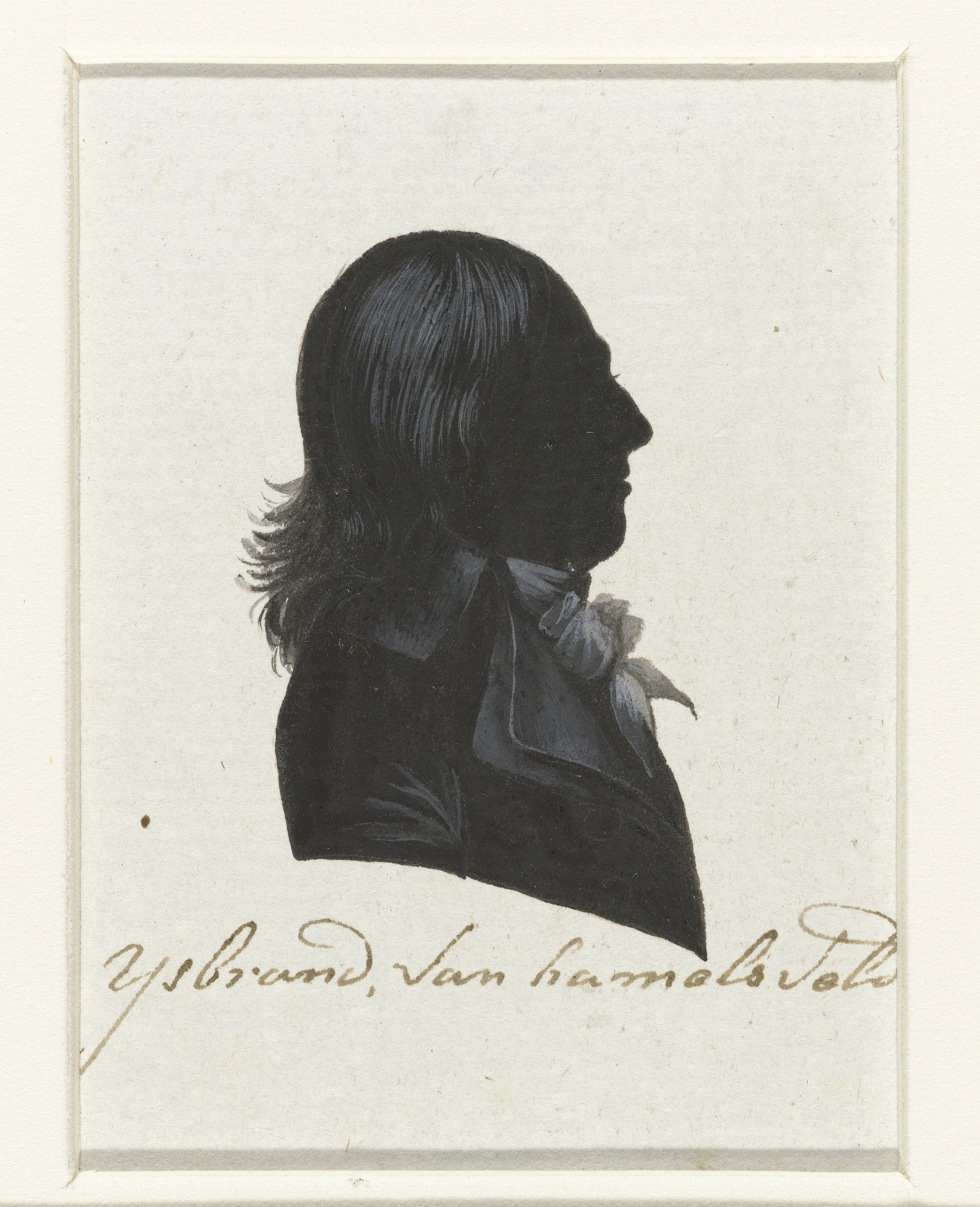 IJ. van Hamelsveld. Tekening in Oost-Indische inkt, waarschijnlijk gemaakt door Hausdorff. De tekening behoort tot een serie van portretten van afgevaardigden naar de Eerste Nationale Vergadering in 1796-1797. Van de serie werden gravures gemaakt die zijn afgedrukt in "Geschiedenis der staatsregeling, voor het Bataafsche volk", een boek van Cornelius Rogge (1799).